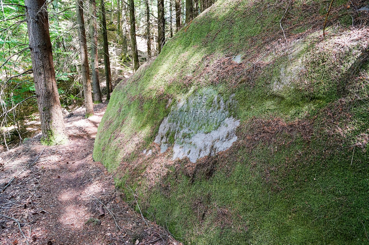 Rentnerpfad Inschrift Lemberg (Pfalz)